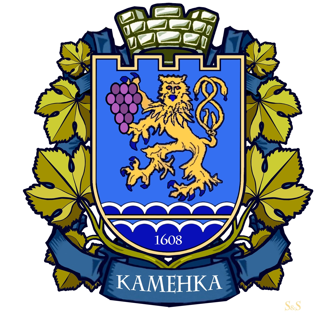 Wappen von Camenca